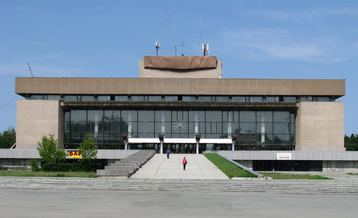 Дворец Культуры Уралмашзавода, Театр «Провинциальные танцы».